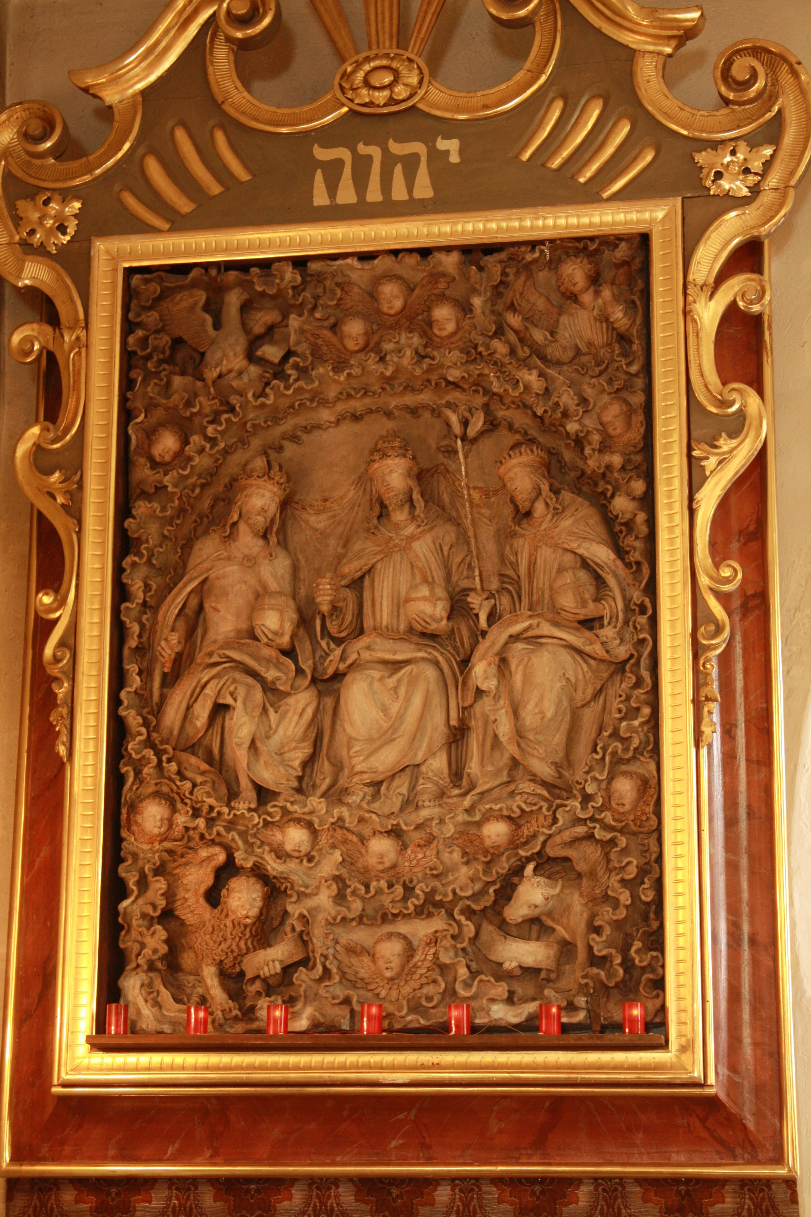 Töpferaltar der Kath. Filialkirche hl. Helena in Baden (Niederösterreich)